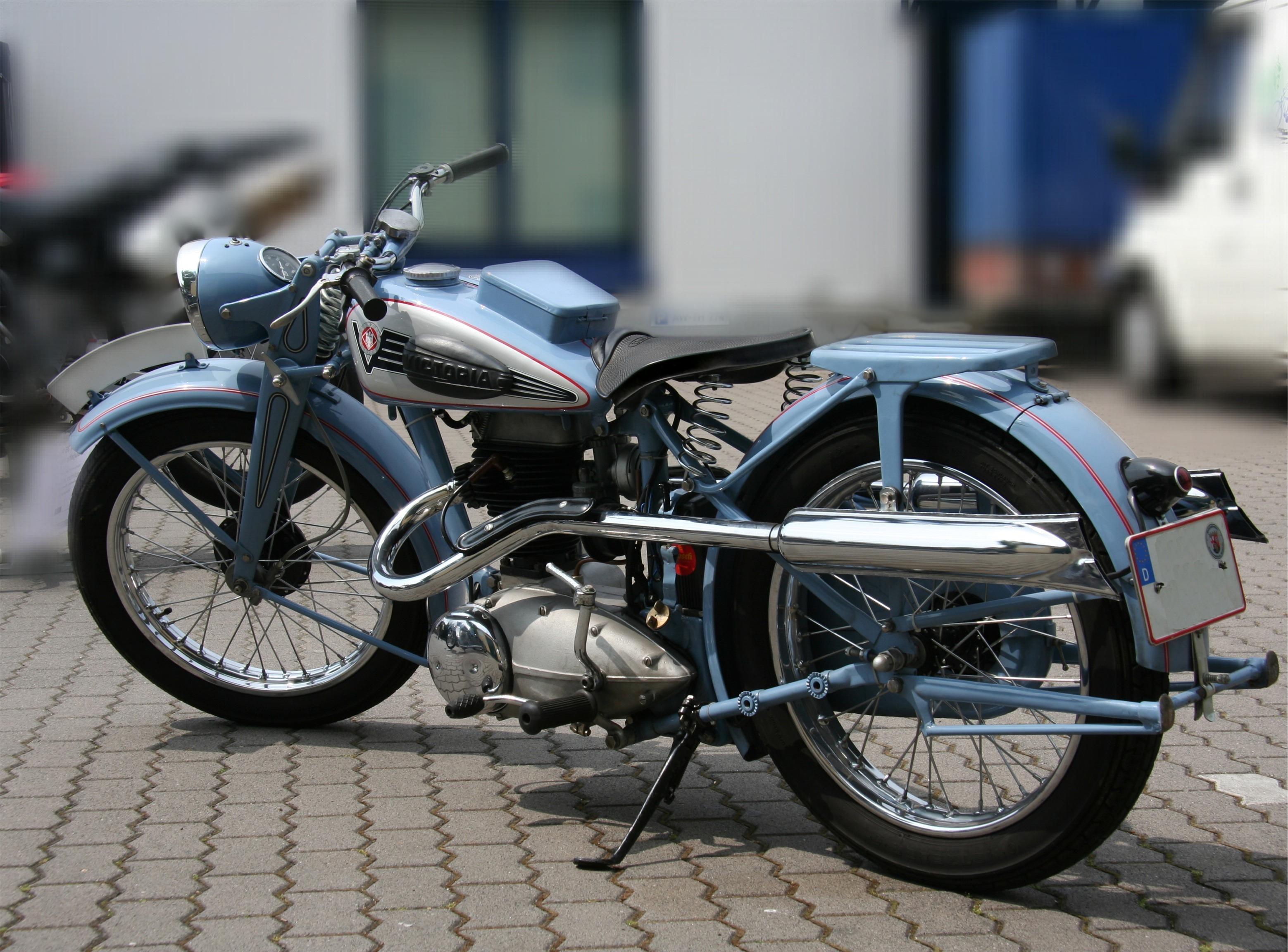 Victoria KR 35 Pionier, Baujahr 1942, 1-Zylinder-Viertaktmotor, 342 cm³, 18 PS bei 5000/min, Höchstgeschwindigkeit 110 km/h